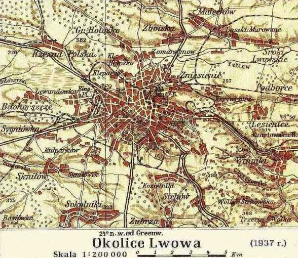 Lwów i okolice, a map, before 1937